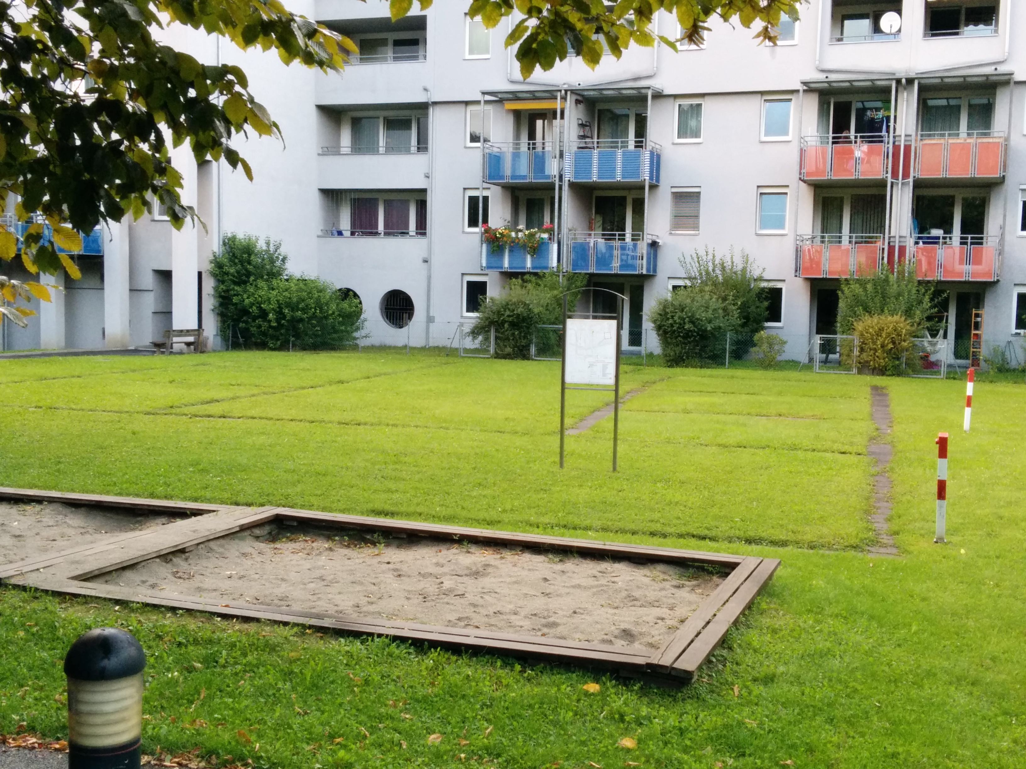 Vicus Veldidena, römische Gebäude (Riese Haymon)